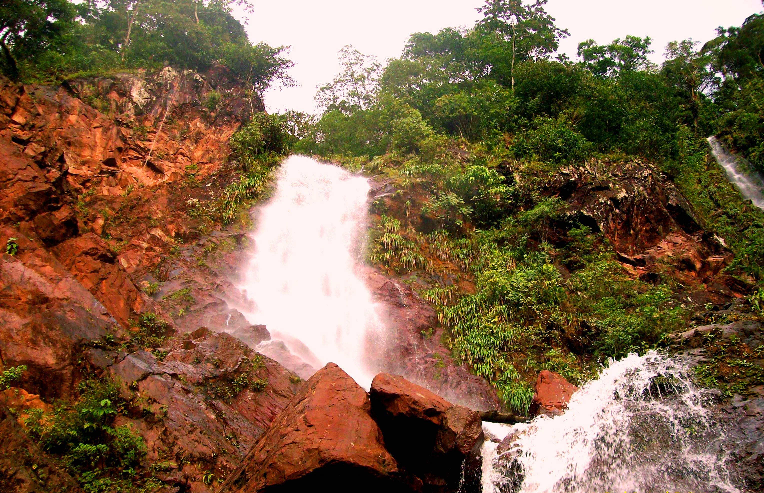 Cascada Chorro El Indio, Estado Tachira.